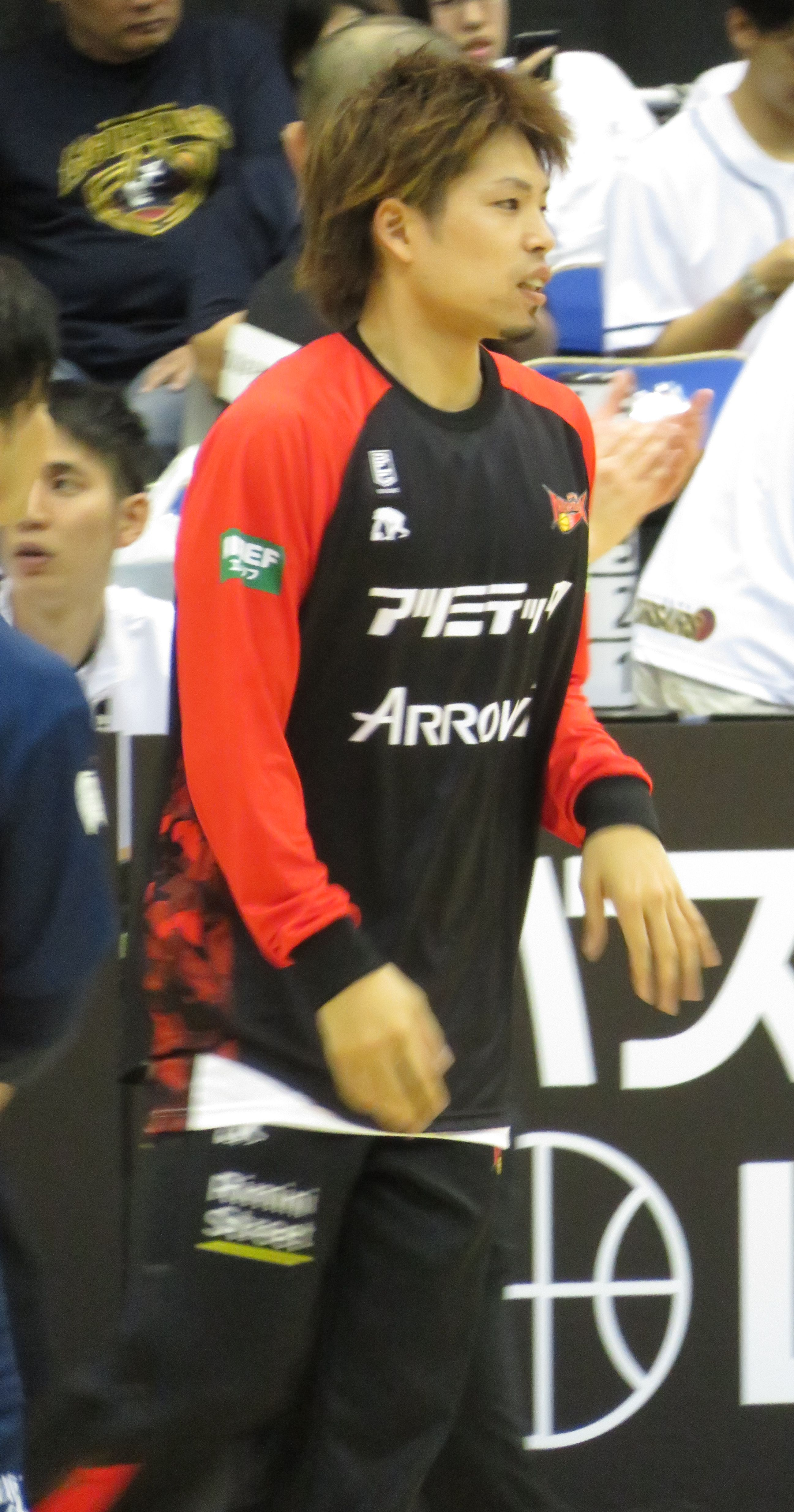 2018年11月7日 2018-19 B1 第8節 横浜-三遠 横浜国際プール